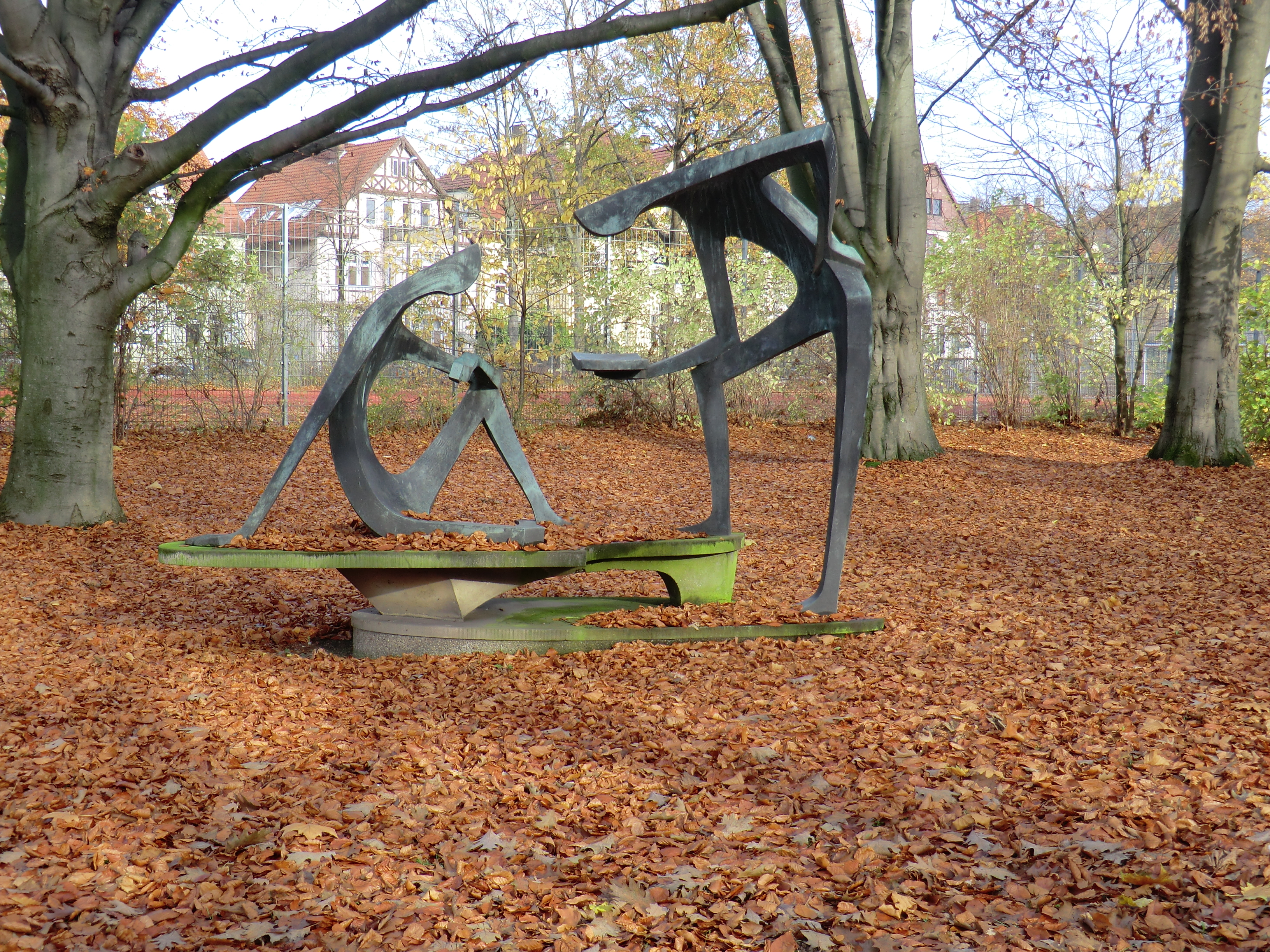 Sculptur am Ravensberger Gymnasium